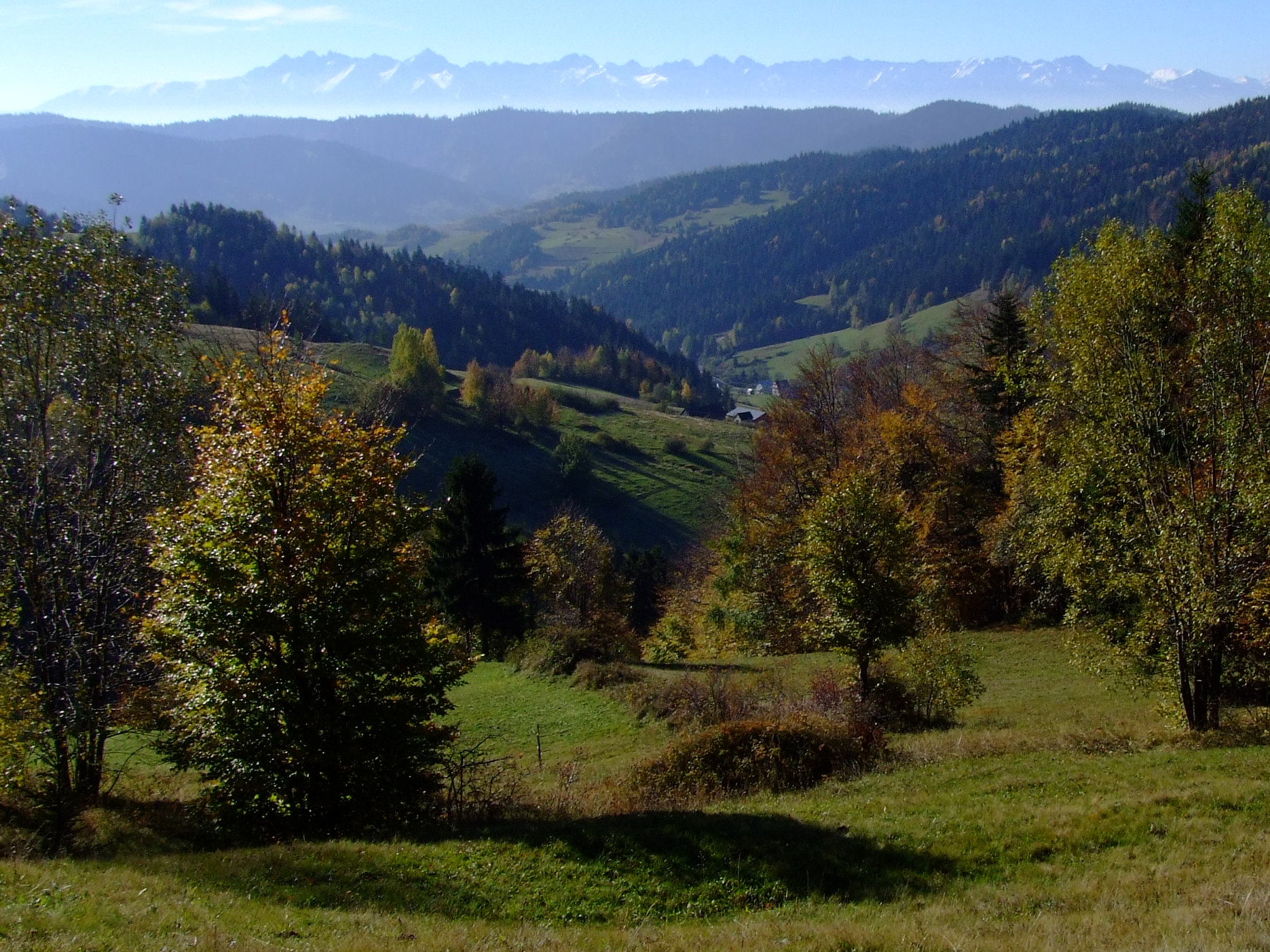 Ochotnica Górna. Widok z doliny potoku Jamne na pasmo Lubania i Tatry